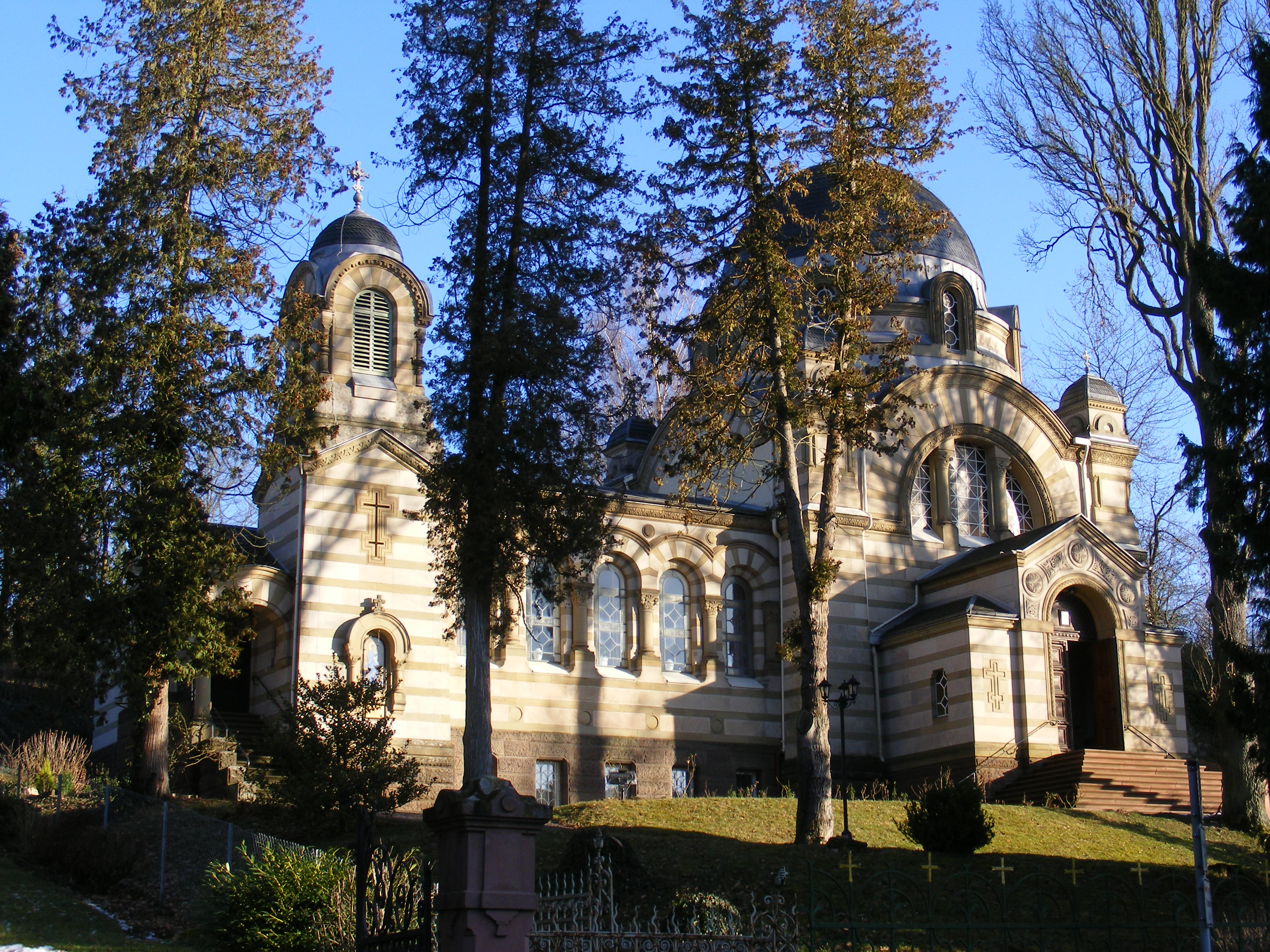 Russisch-orthodoxe Kirche in Bad Kissingen Kirche des Sergius von Radonesch - Frontansicht.